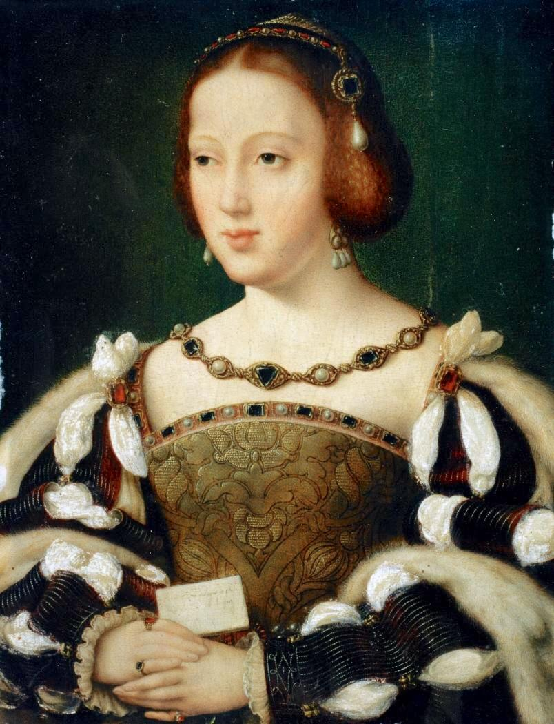 Retrato hasta la cintura, de tres cuartos a la izquierda, con carta en las manos cruzadas. Rico vestido con mangas acuchilladas bordadas con aljófar y lazos con pedrería en los hombros, corpiño de brocado rico de oro, con pedrería en el descote, gran collar de pedrería y piedras y perlas en joyeles entre el pelo. Fondo gris verdoso matizado. En la carta letras ahora casi borradas.